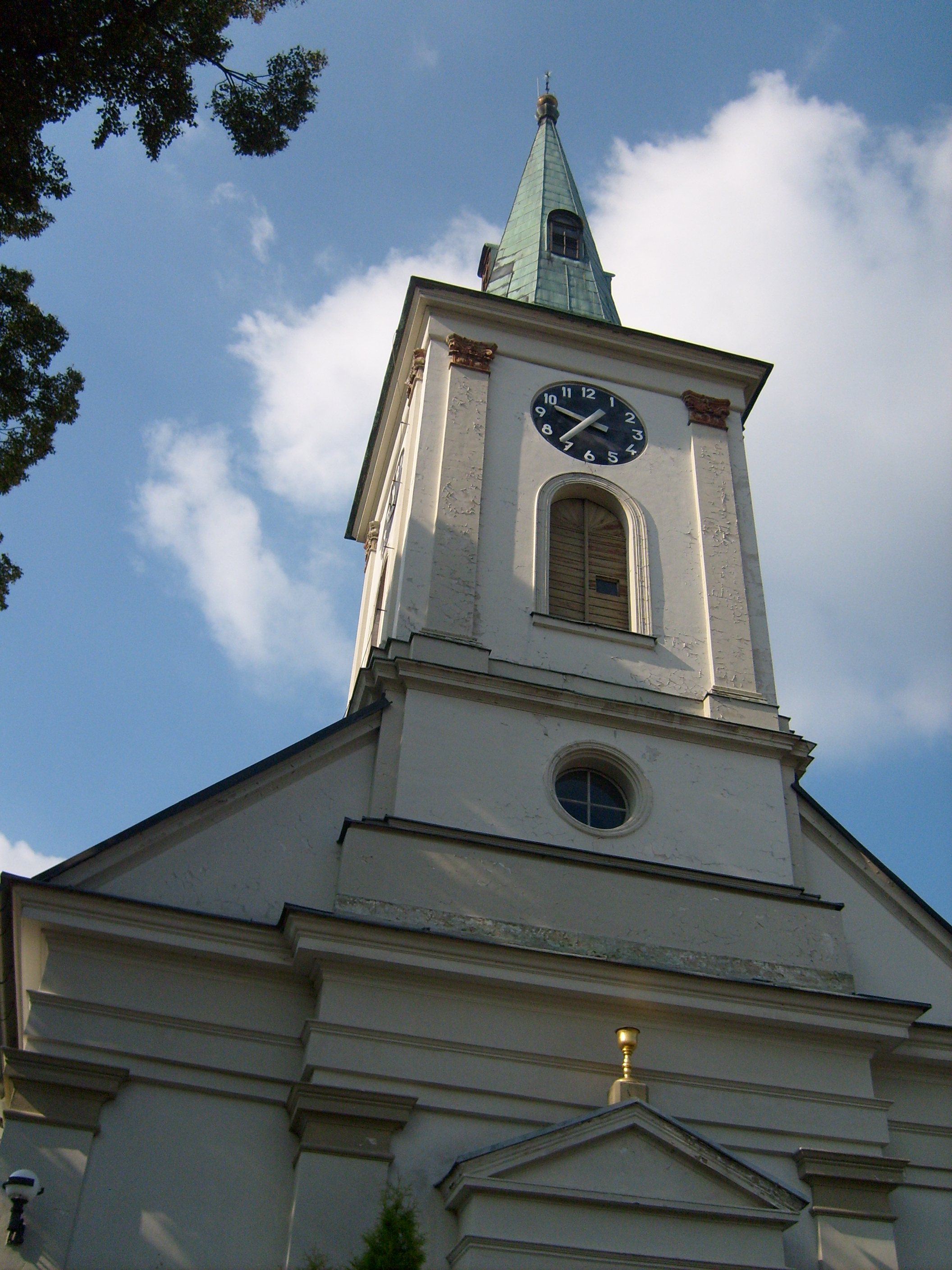 Kostel Českobratrské církve evangelické, Jimramov, Vysočina Region, Czech Republic